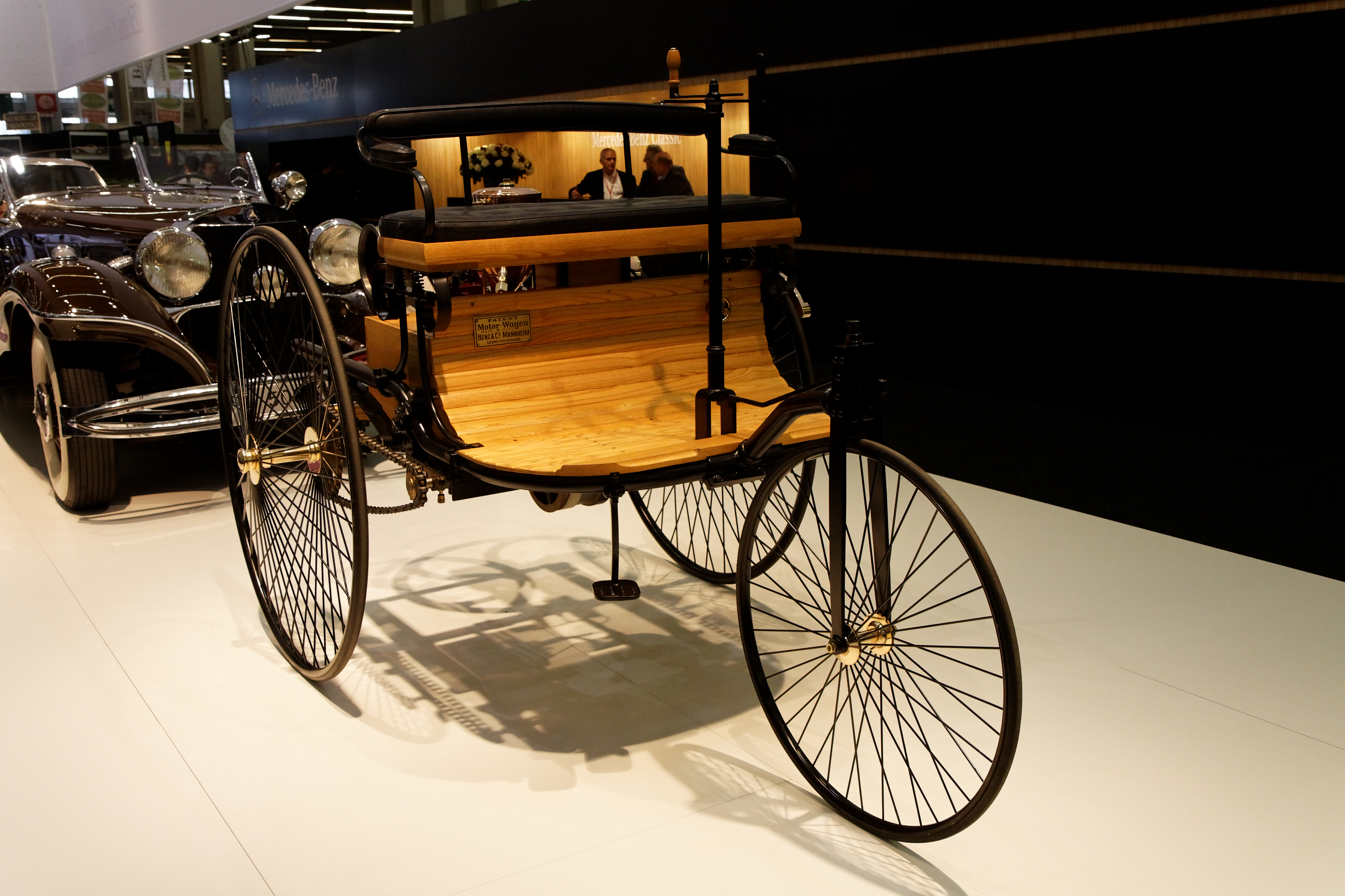 Photographie prise lors du salon rétromobile 2011 à Paris, porte de Versailles.